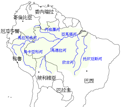 亞馬遜河盆地。